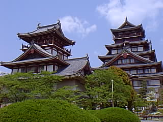 伏見桃山城天守閣（再建）